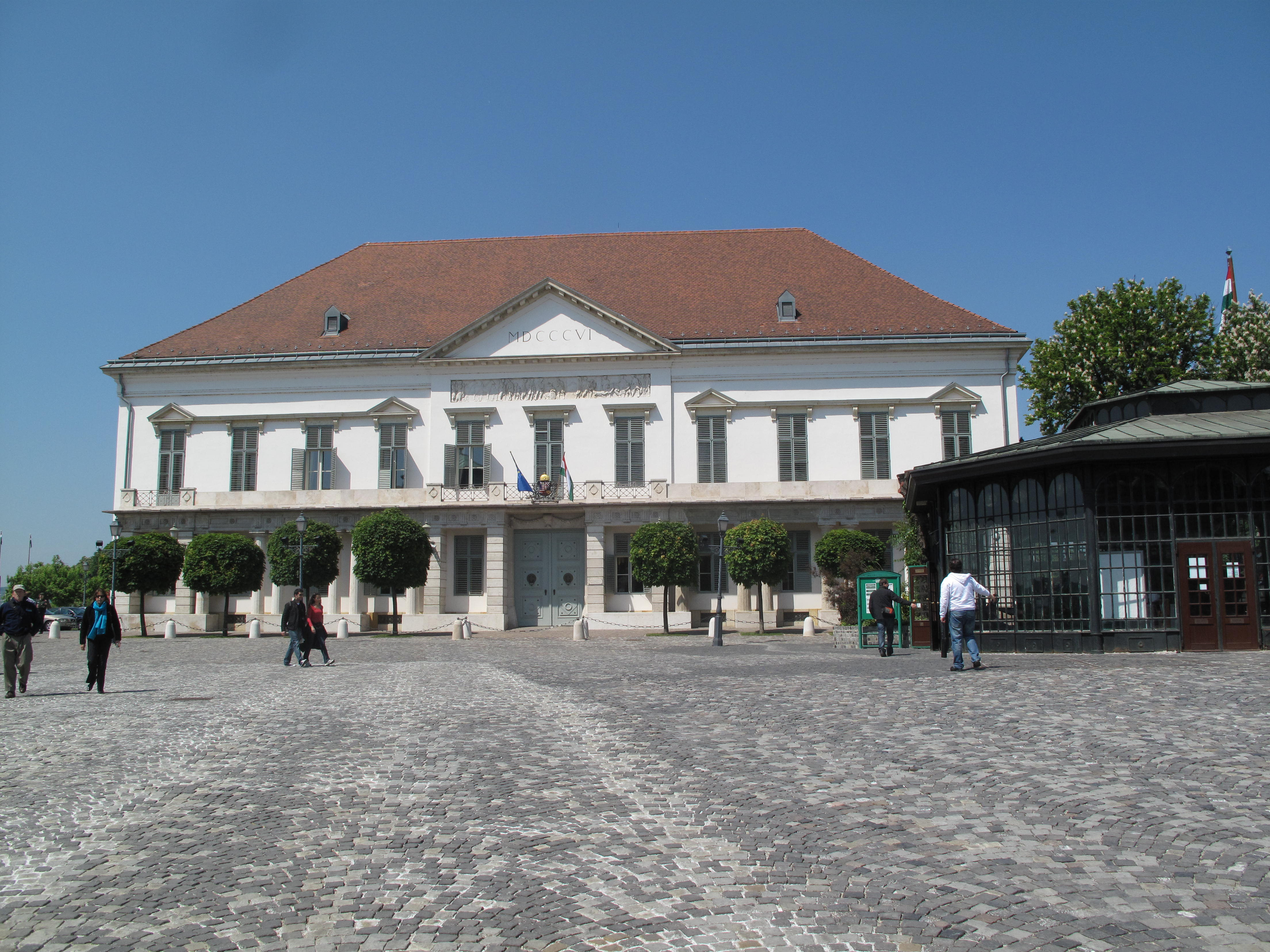 Budapešť